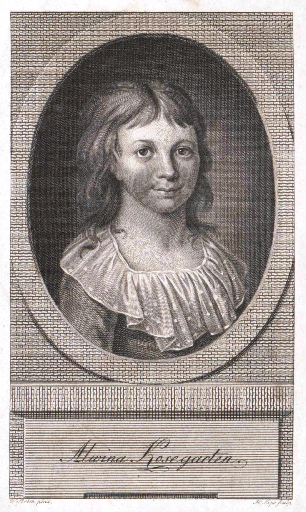 Alwina Luise Kosegarten (1789–1864), Tochter von Ludwig Gotthard Kosegarten